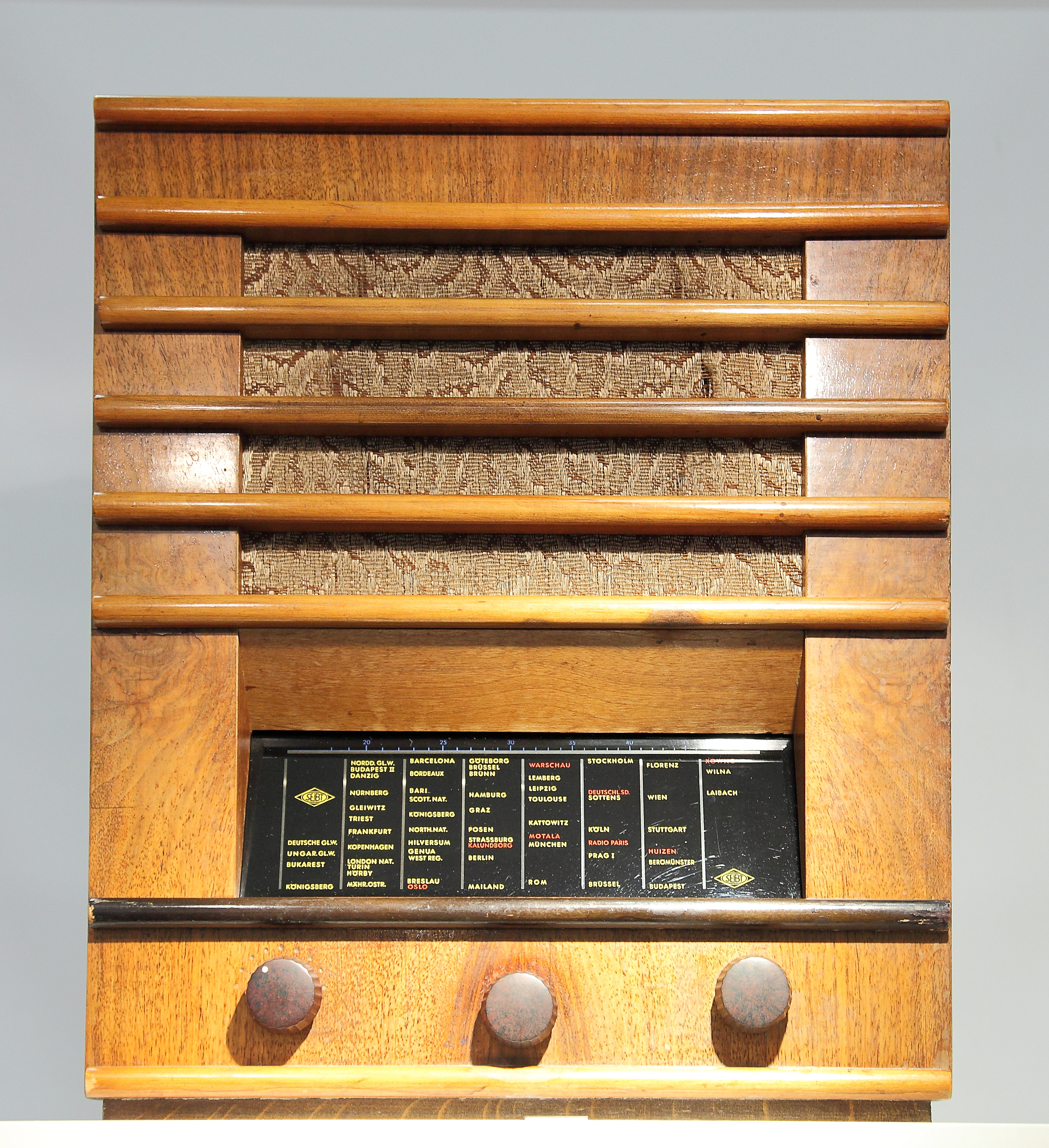 Deutsches Rundfunk-Museum, Ausstellung auf der Internationalen Funkausstellung 2012 in Berlin